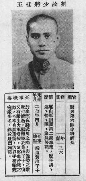 抗戰軍人忠烈錄第一輯中的烈士遺像